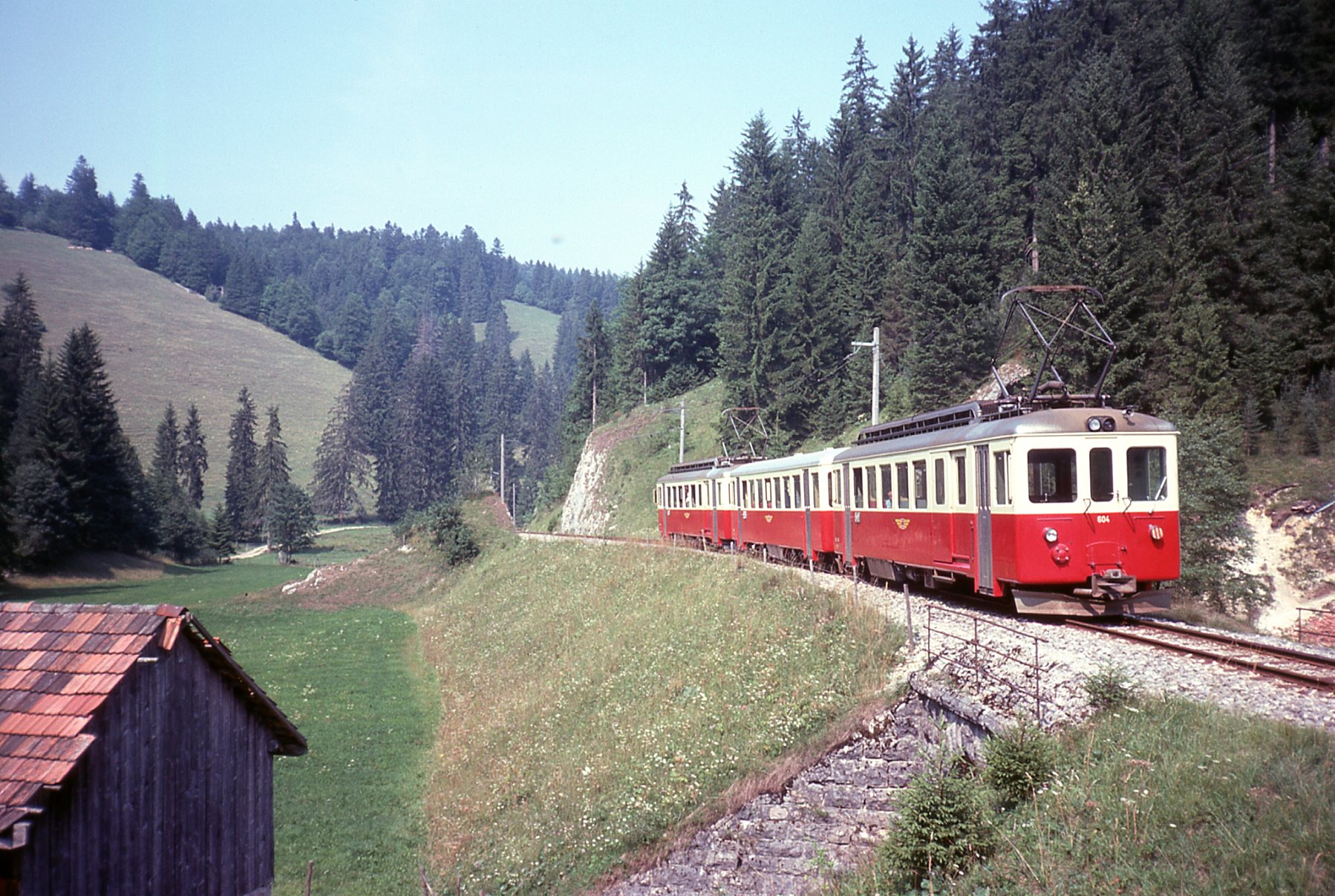 Photo: Trams aux Fils. Prise en août 1976 La ligne du C.J. Chemin de Fer du Jura à été construite entre 1884 et 1913 à voie métrique, sa longueur et de 51,1 Kilomètres